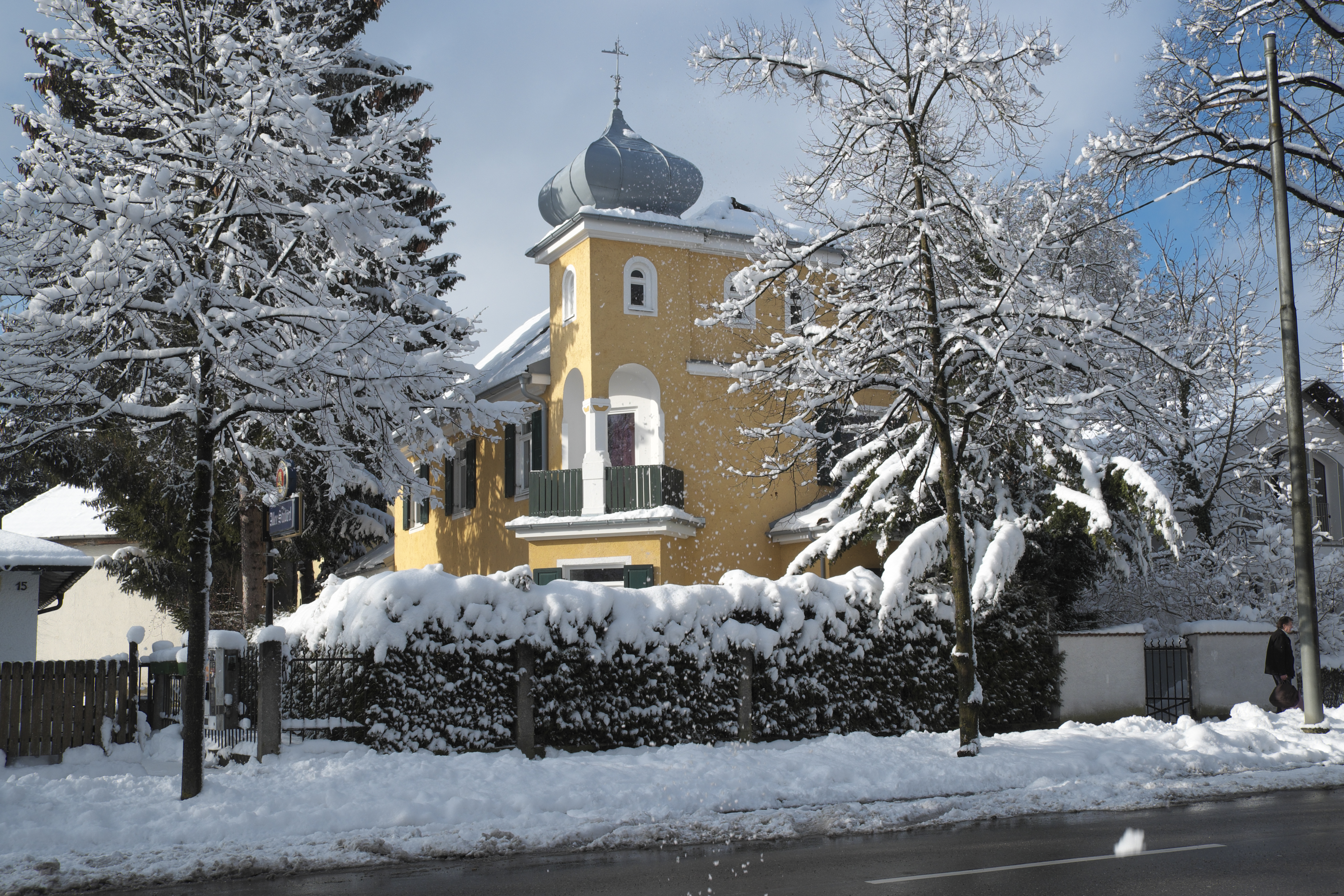 Villa in der Alten Allee 17 in Obermenzing im Stadtbezirk Pasing-Obermenzing in München (Bayern/Deutschland), 1897 von August Exter und Otto Numberger erbaut